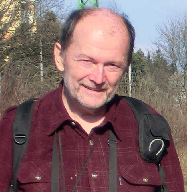 Dr. Petr Rajlich